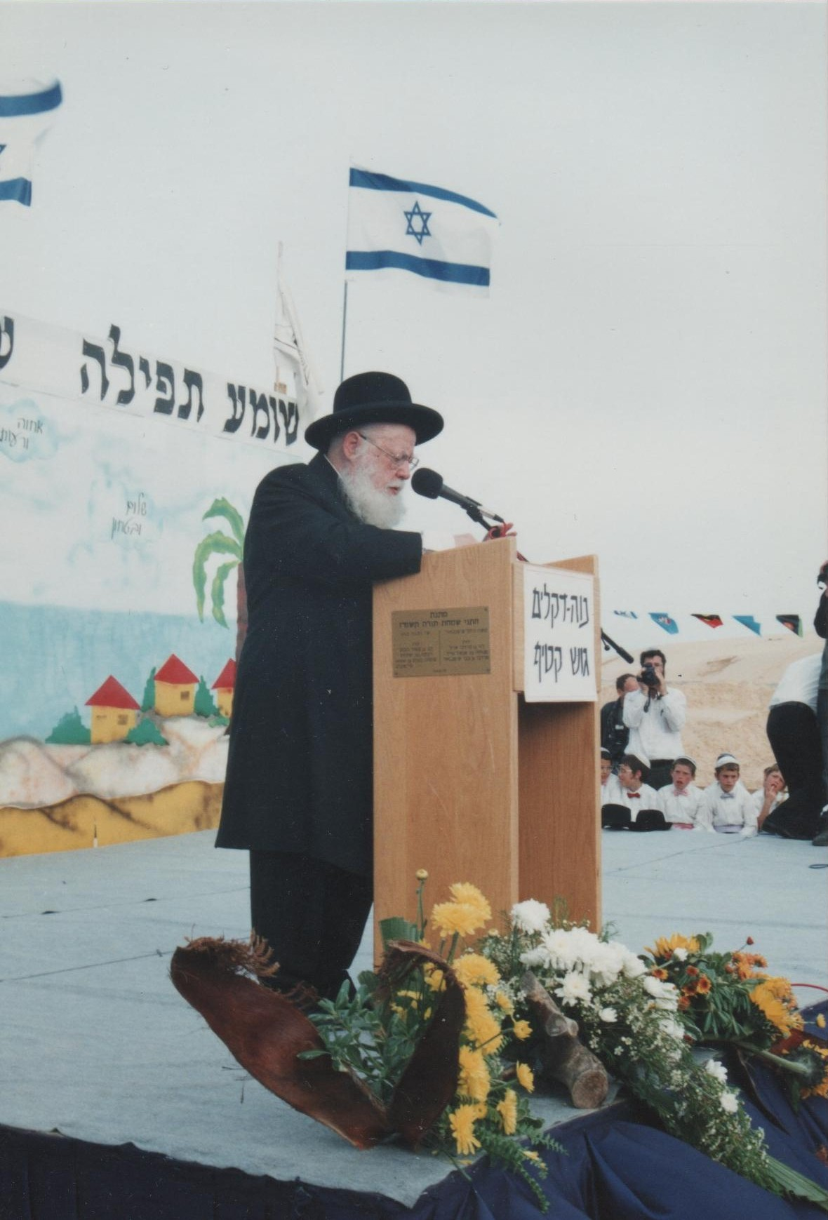 ישיבת מרכז הרב.